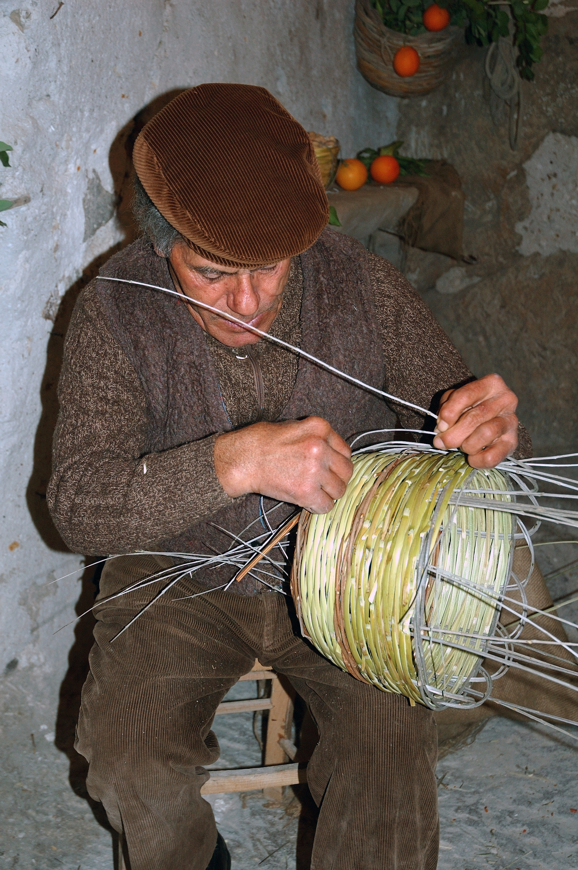 Tratto dal Presepe vivente di Sutera ,artigiano che fabbrica ceste con fibre naturali